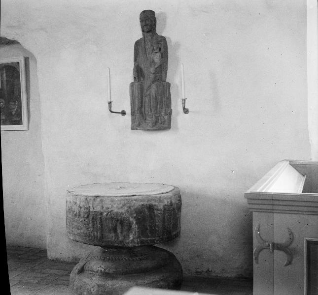 Dopfunt av sandsten. Medeltida. Kategori: (04) DopfuntarDopfunt av sandsten. Medeltida.